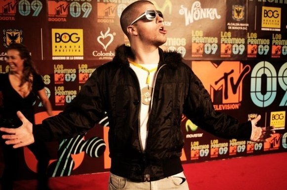 Piero pic.